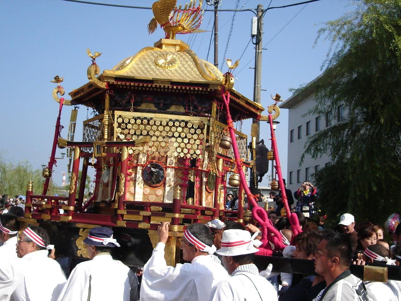 西条祭りの中の伊曾乃例大祭の御神輿(ごしんよ)。地元では神さんと呼ばれ親しまれている。